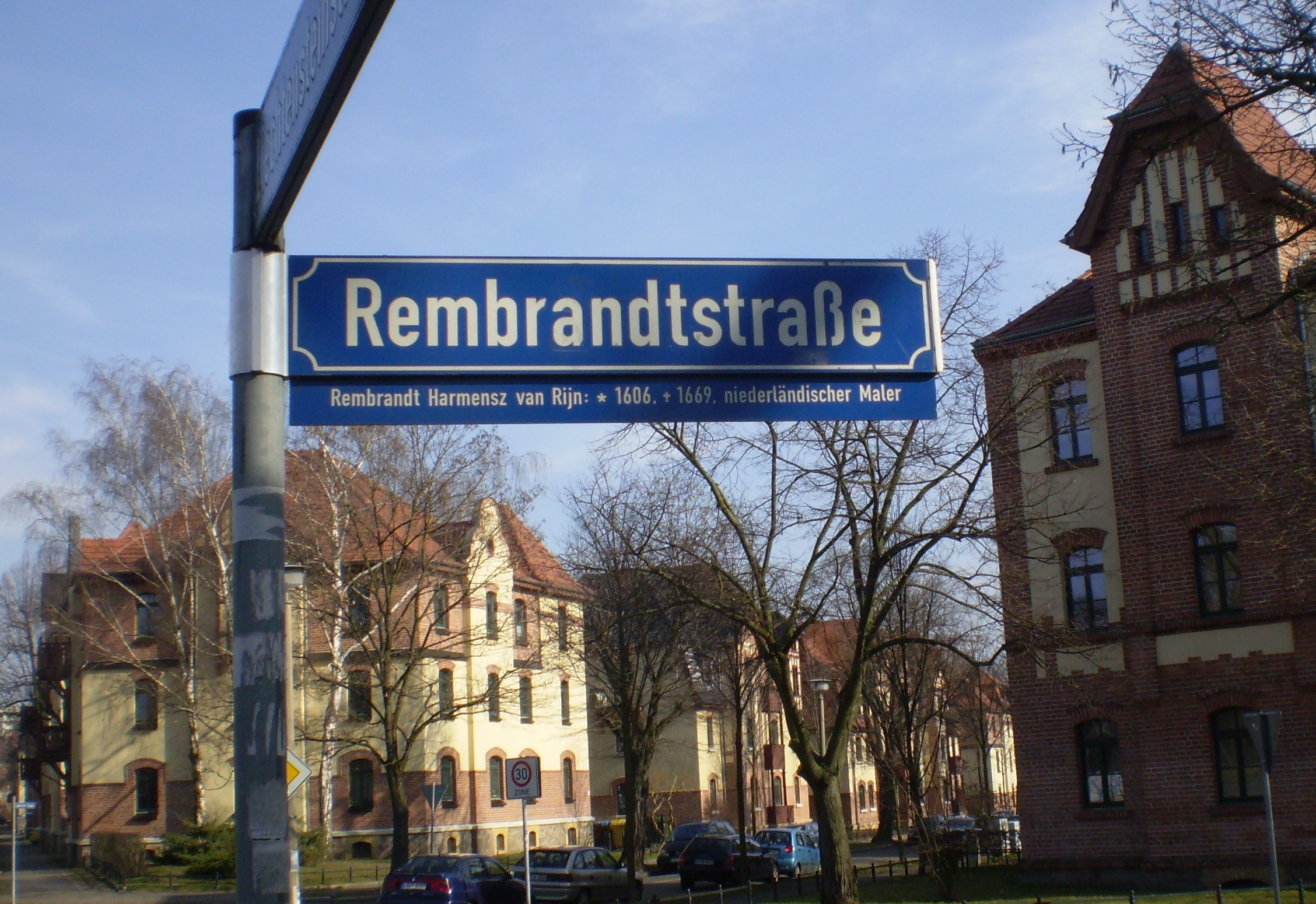 Straßenschild in Leipzig Lößnig; Rembrandtstraße (ehemals Merveldtstraße)